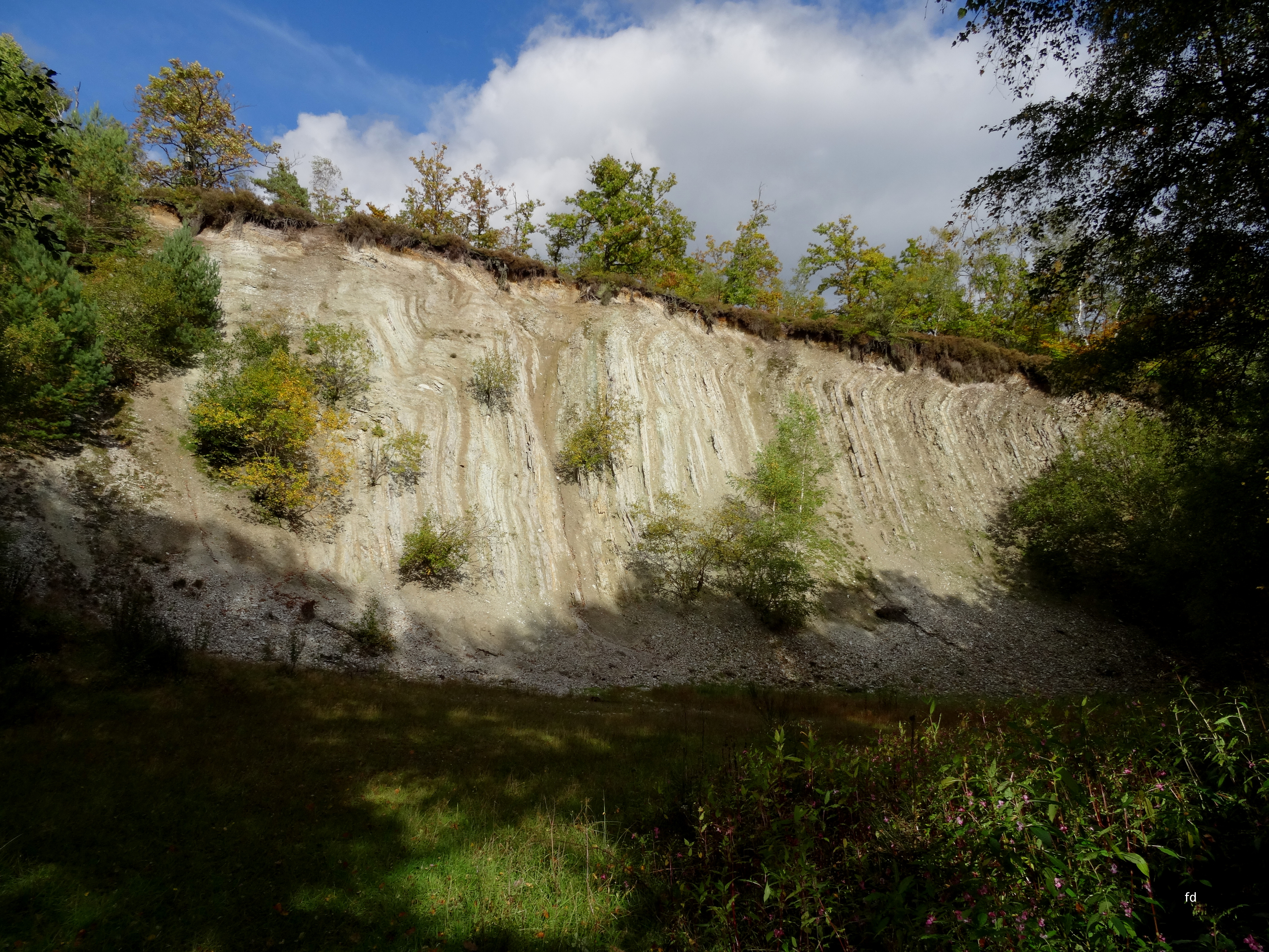 NSG Niederwald Odin Mergelsteinbruch